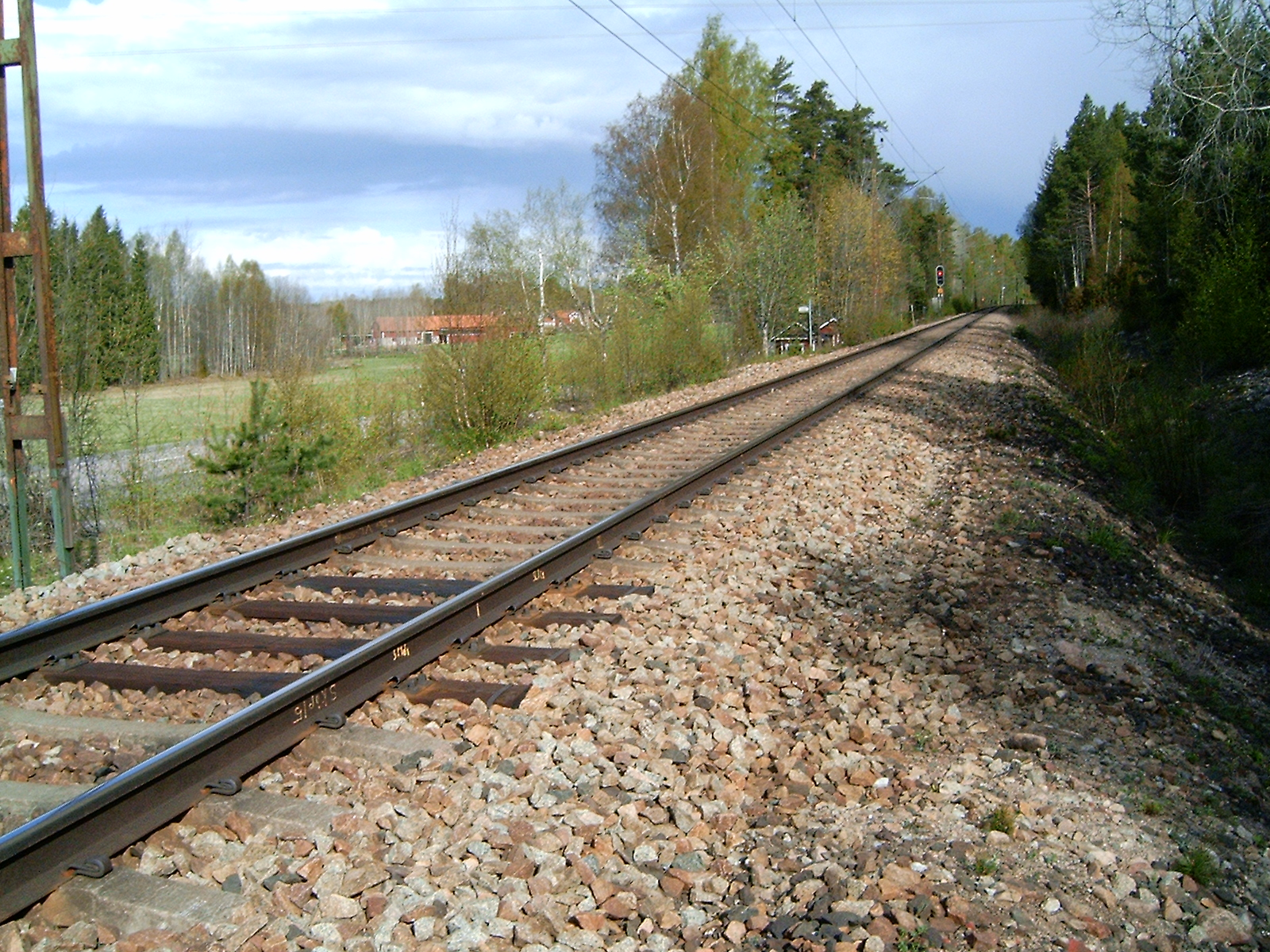 Räls med betongslipers (fast fyra är i trä).